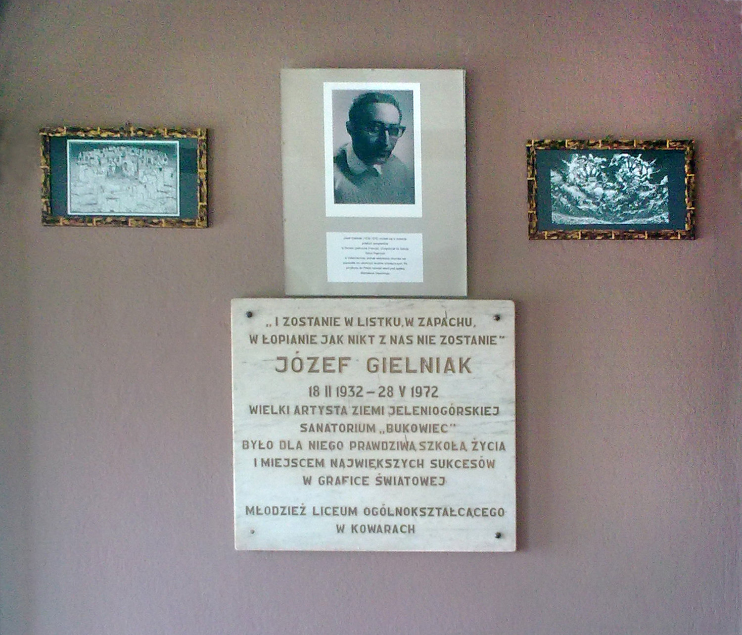 Tablica pamiątkowa w Szpitalu Bukowiec, upamiętniająca Józefa Gielniaka